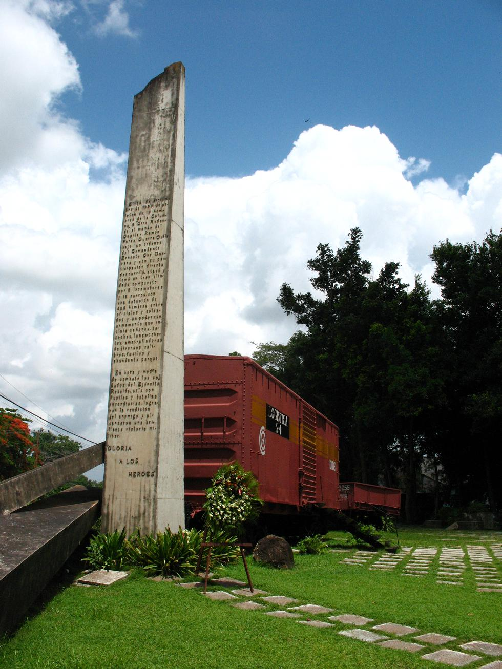 Tren que hizo descarrilar el Che en Santa Clara